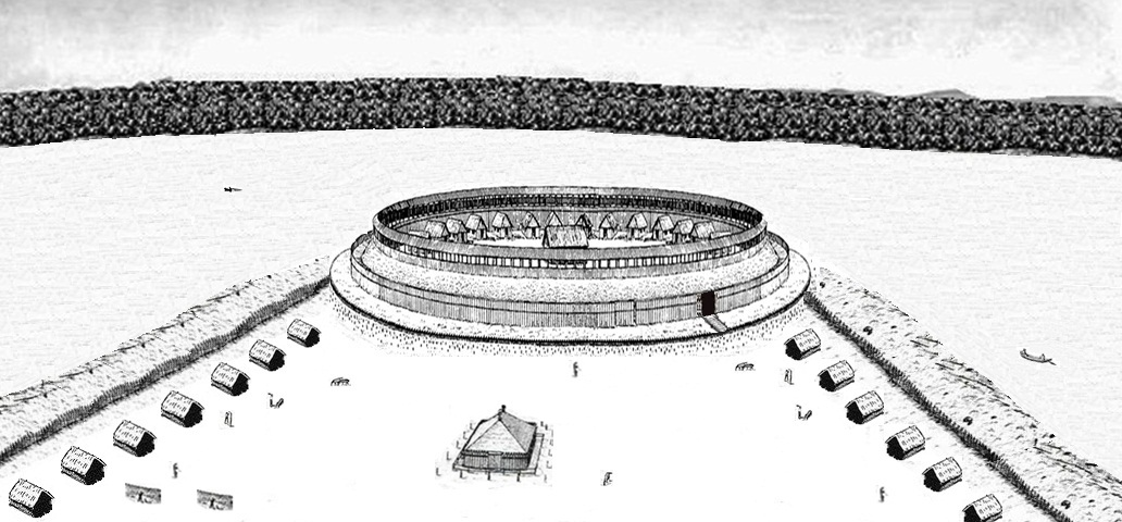 Burgwall "Englischer Garten" bei Penzlin in Mecklenburg-Vorpommern